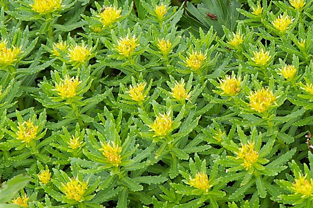 ホソバイワベンケイ （北海道富良野岳）Rhodiola ishidae (Mt. Furano, Hokkaido, JAPAN)